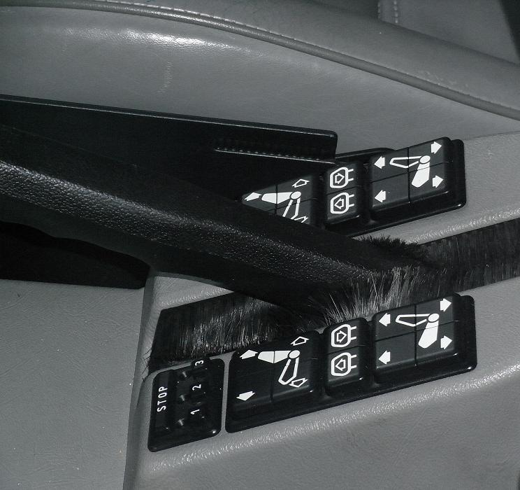 BMW E24 635CSi L6 elektrische Sitzverstellung mit Memory für Fahrersitz (LHD)